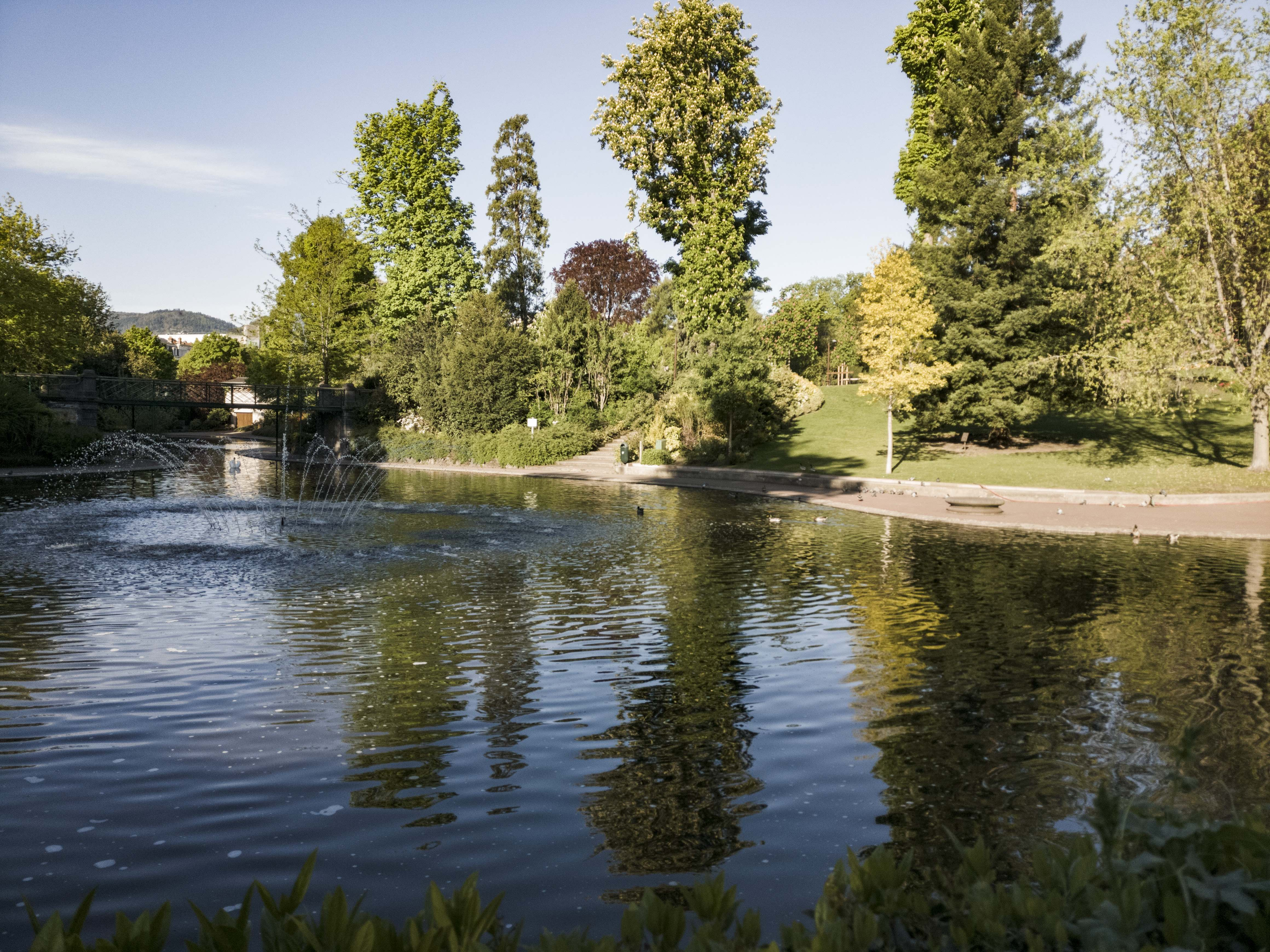 Jardin Lecoq, Clermont-Ferrand, Auvergne, France